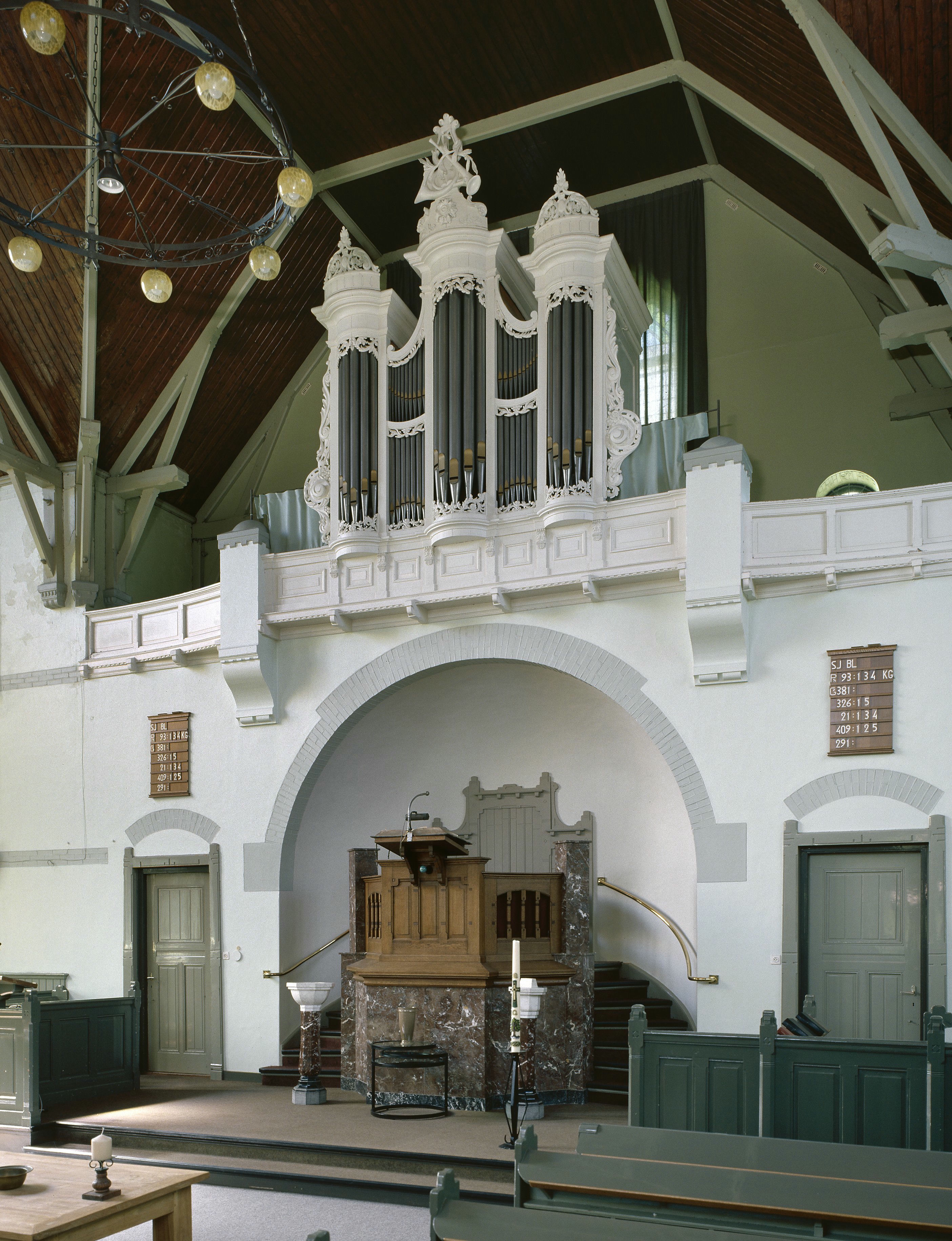 Gereformeerde kerk: Interieur, aanzicht orgel,orgelnummer 895 (opmerking: Gefotografeerd voor Het Historische Orgel in Nederland 1886-1894, bladzijde 95)